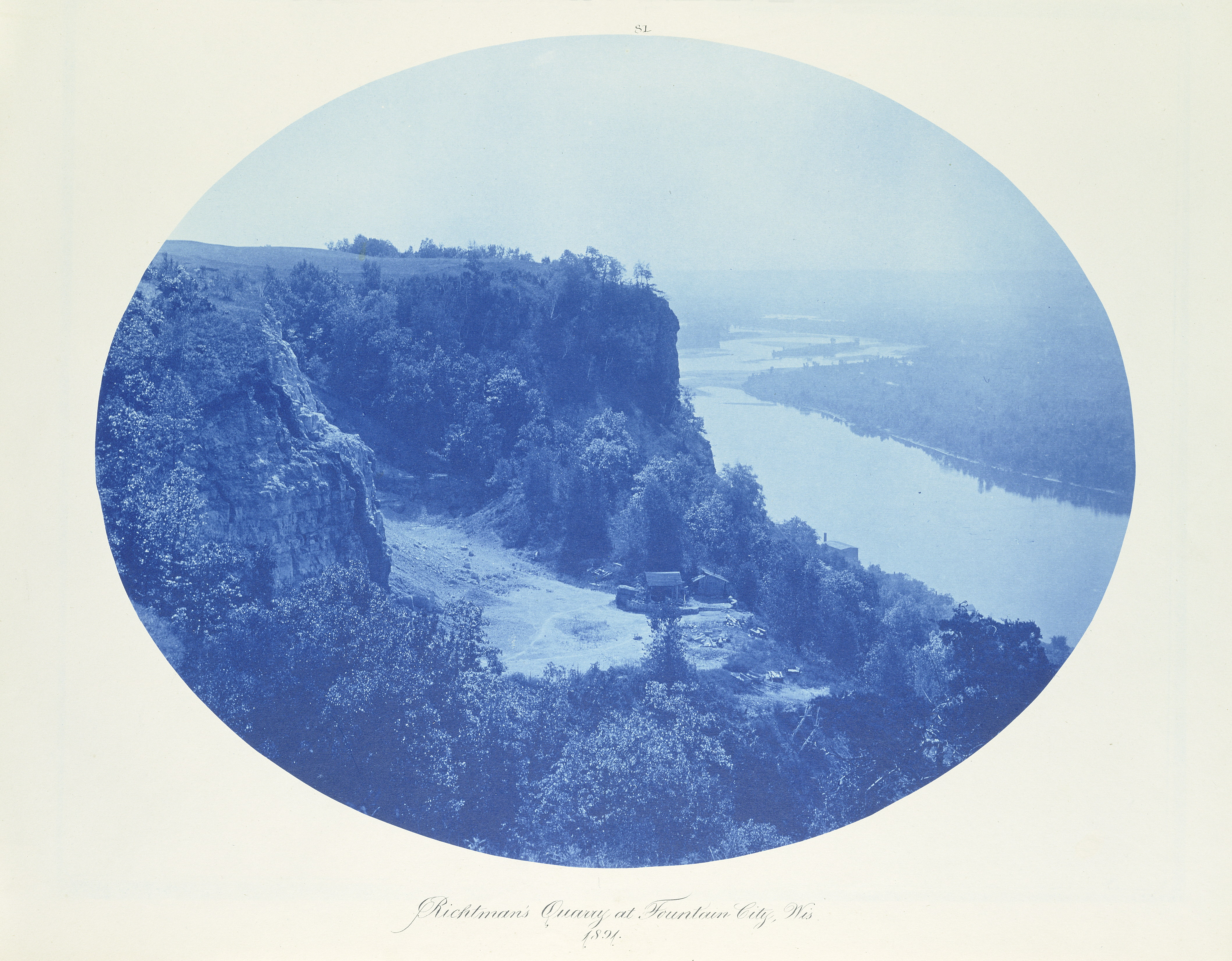 Richtman's quarry at Fontain City, Wisconsin, 1891. Cyanotype d'Henry Peter Bosse.